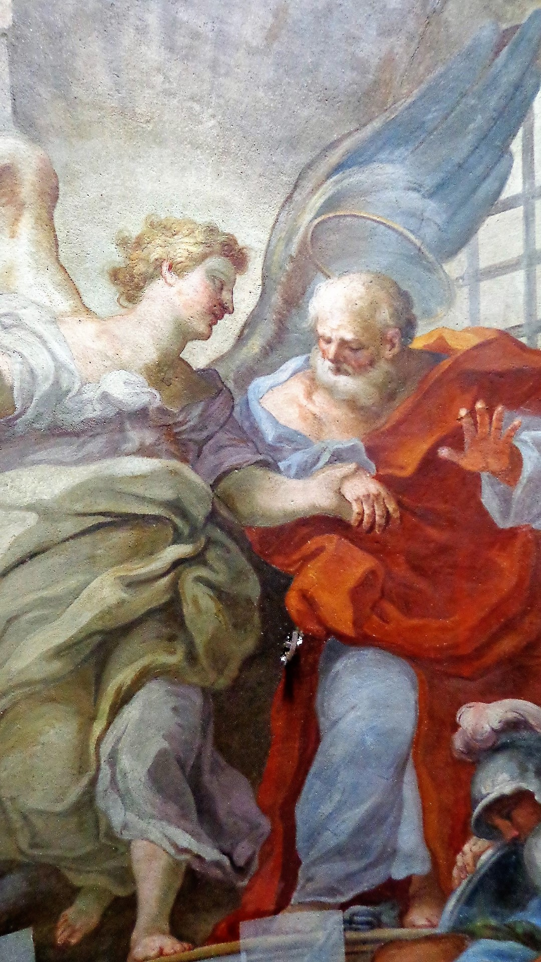 Affresco, particolare. Liberazione di San Pietro di Guglielmo Borremans.